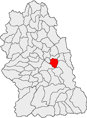 Categorie:Hărţi ale judeţului Hunedoara